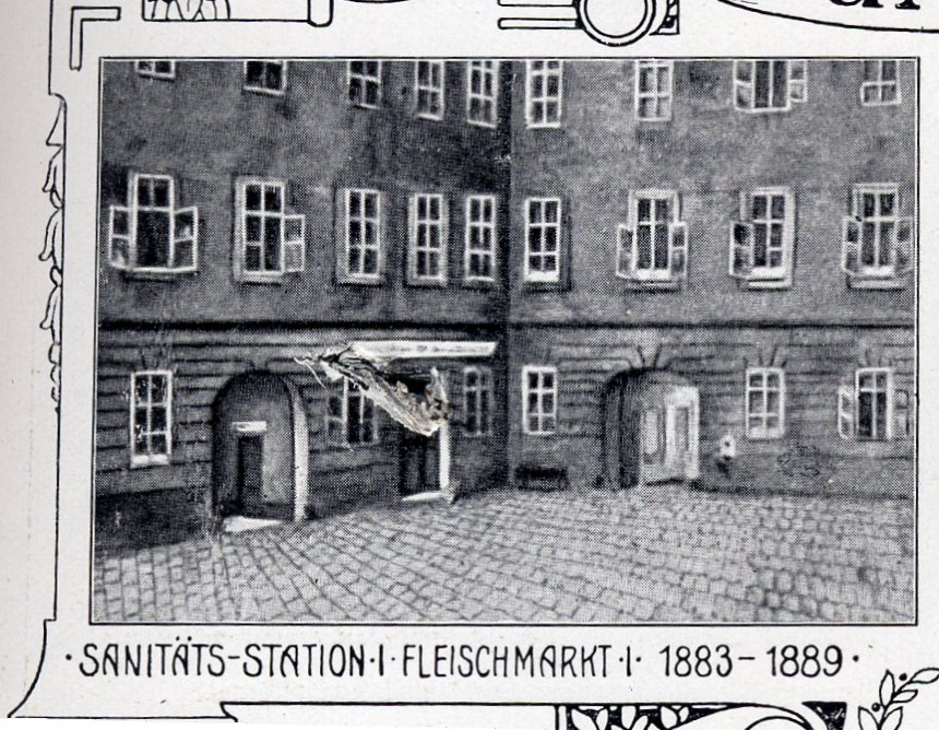 Wien, Sanitätsstation am Fleischmarkt 1